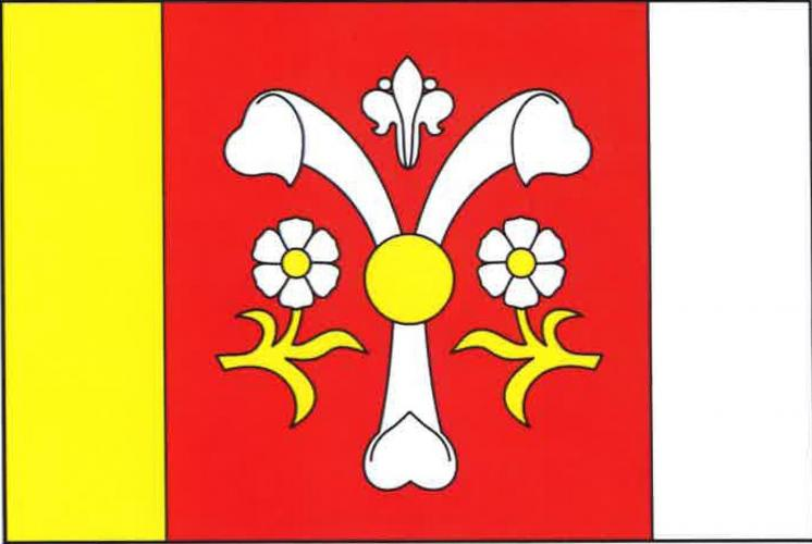 Vyklantice vlajka